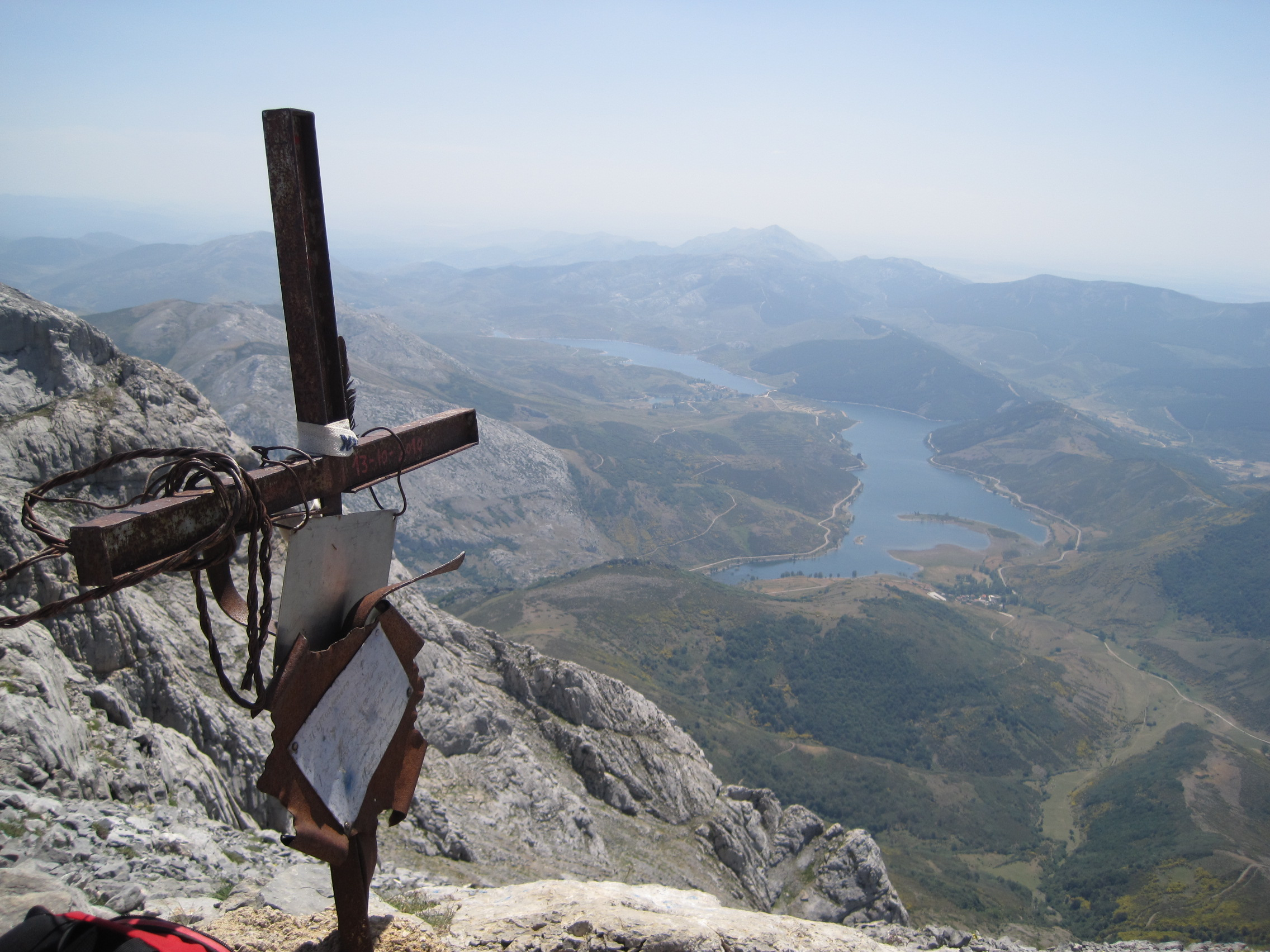 Vista del embalse de Camporredondo (Palencia, España) desde la cima del pico Espigüete